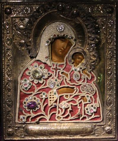 Коневецкая икона Божией Матери, 18 век 31 х 26 см. Церковный музей в Куопио